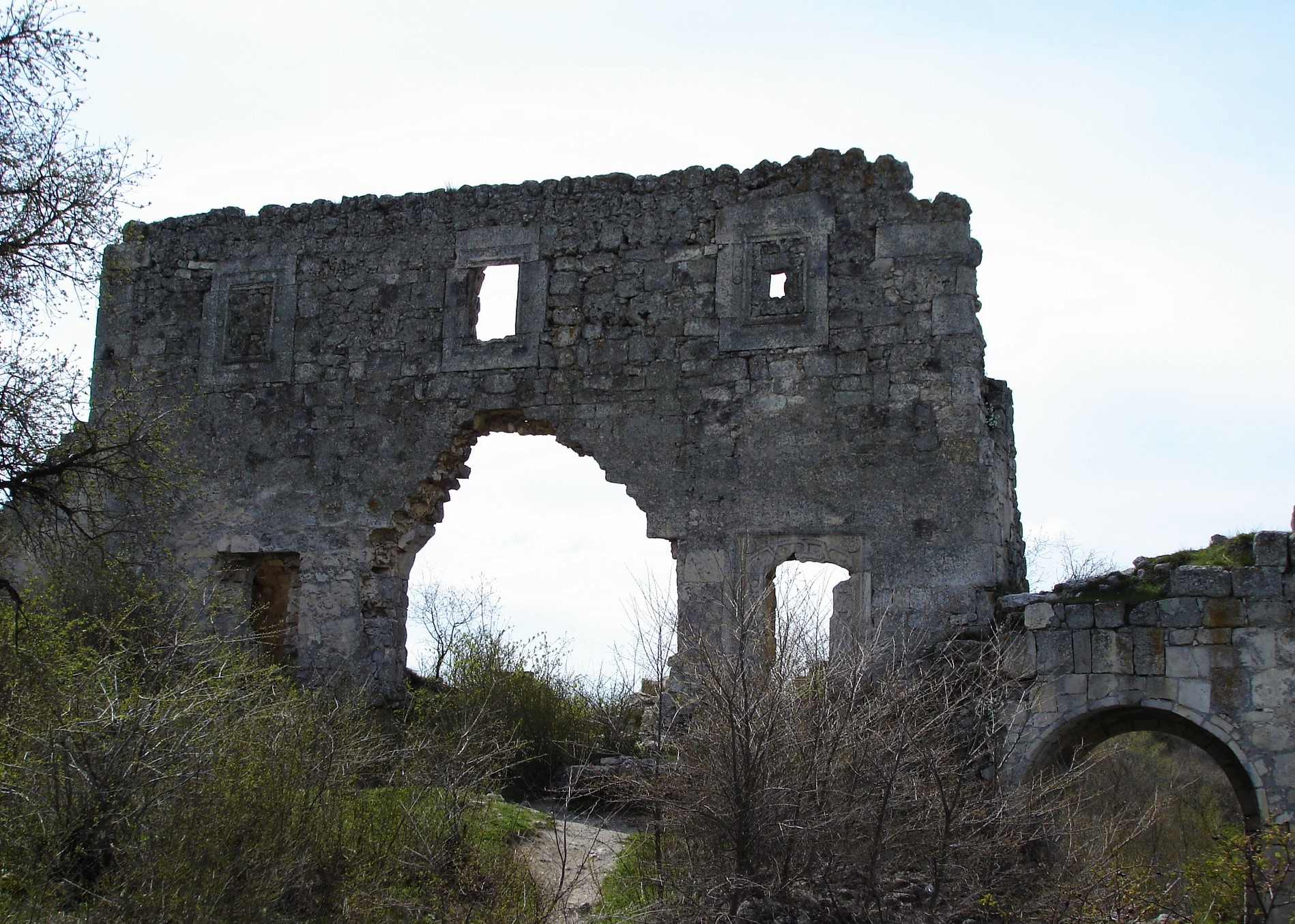 на горі Мангуп